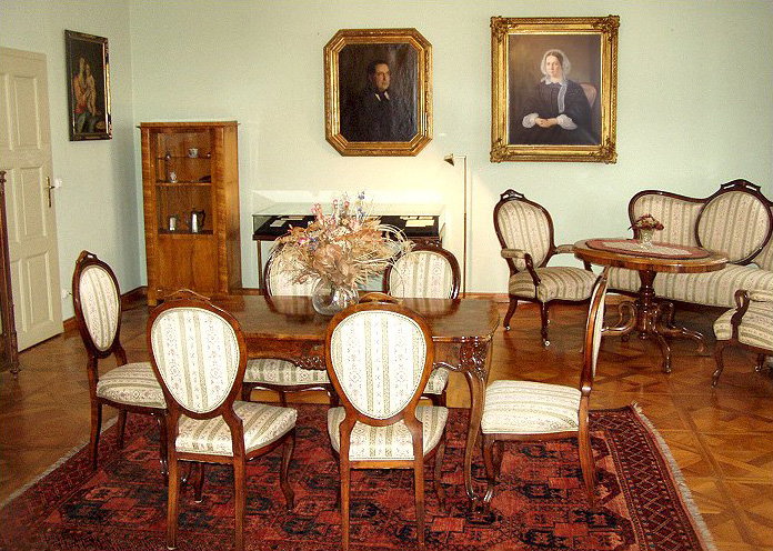 Arbeitszimmer von Adelbert Stifter im Stifterhaus in Linz